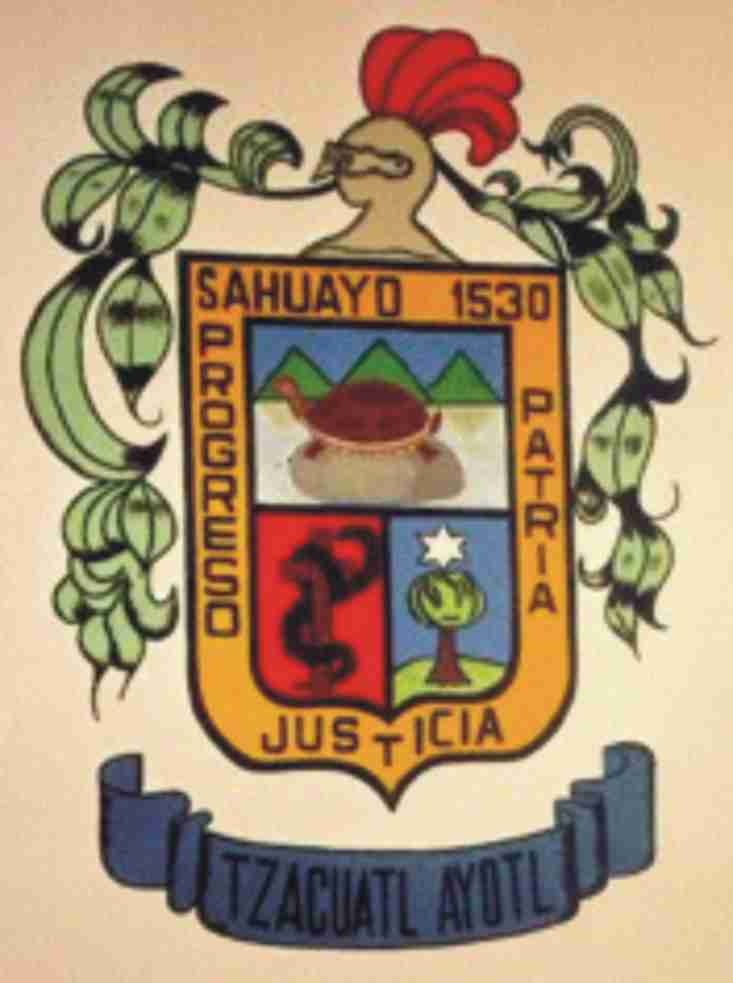 Escudo de Armas de Sahuayo